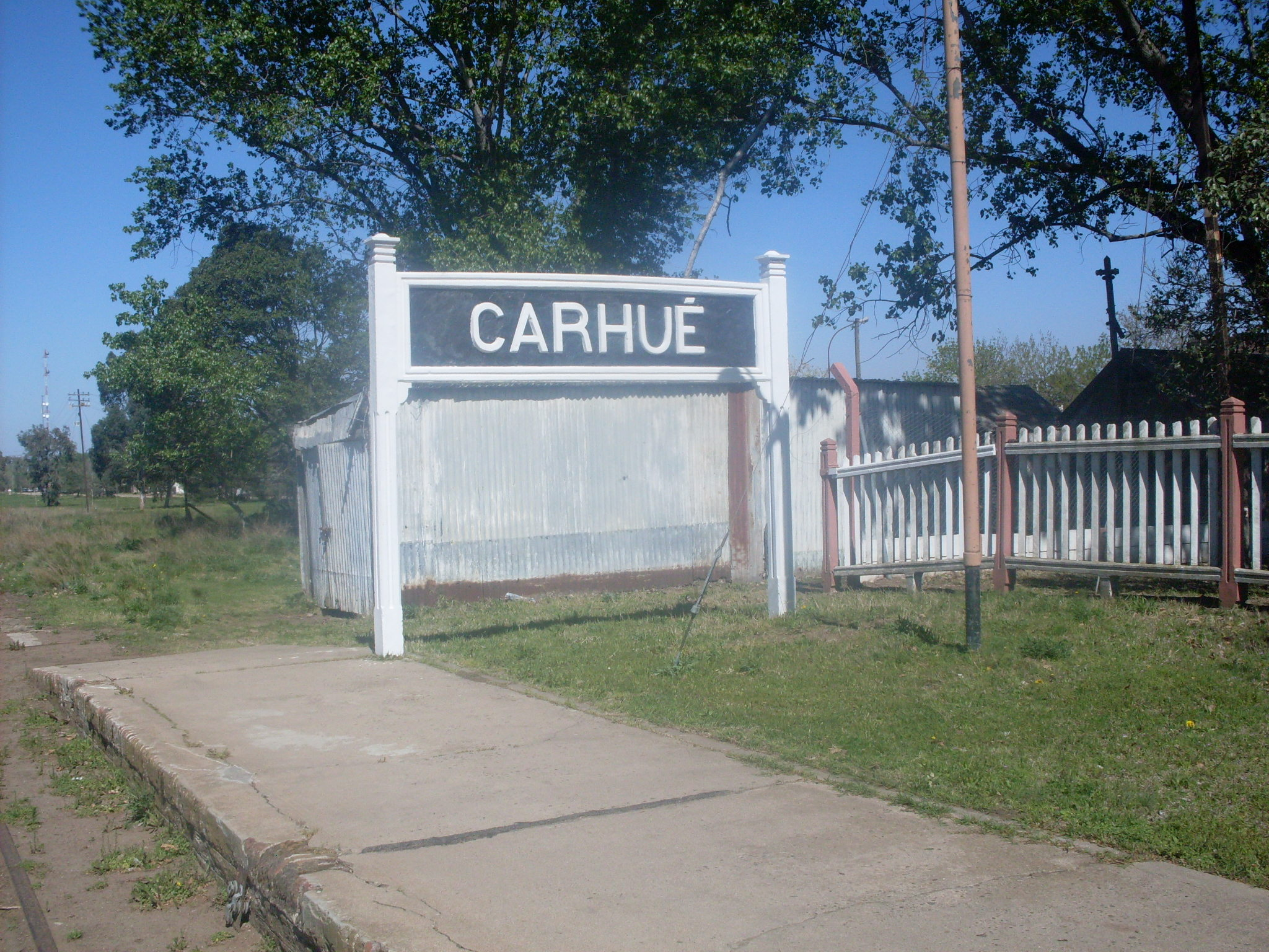 Estación Carhué, prov. de Bs As.